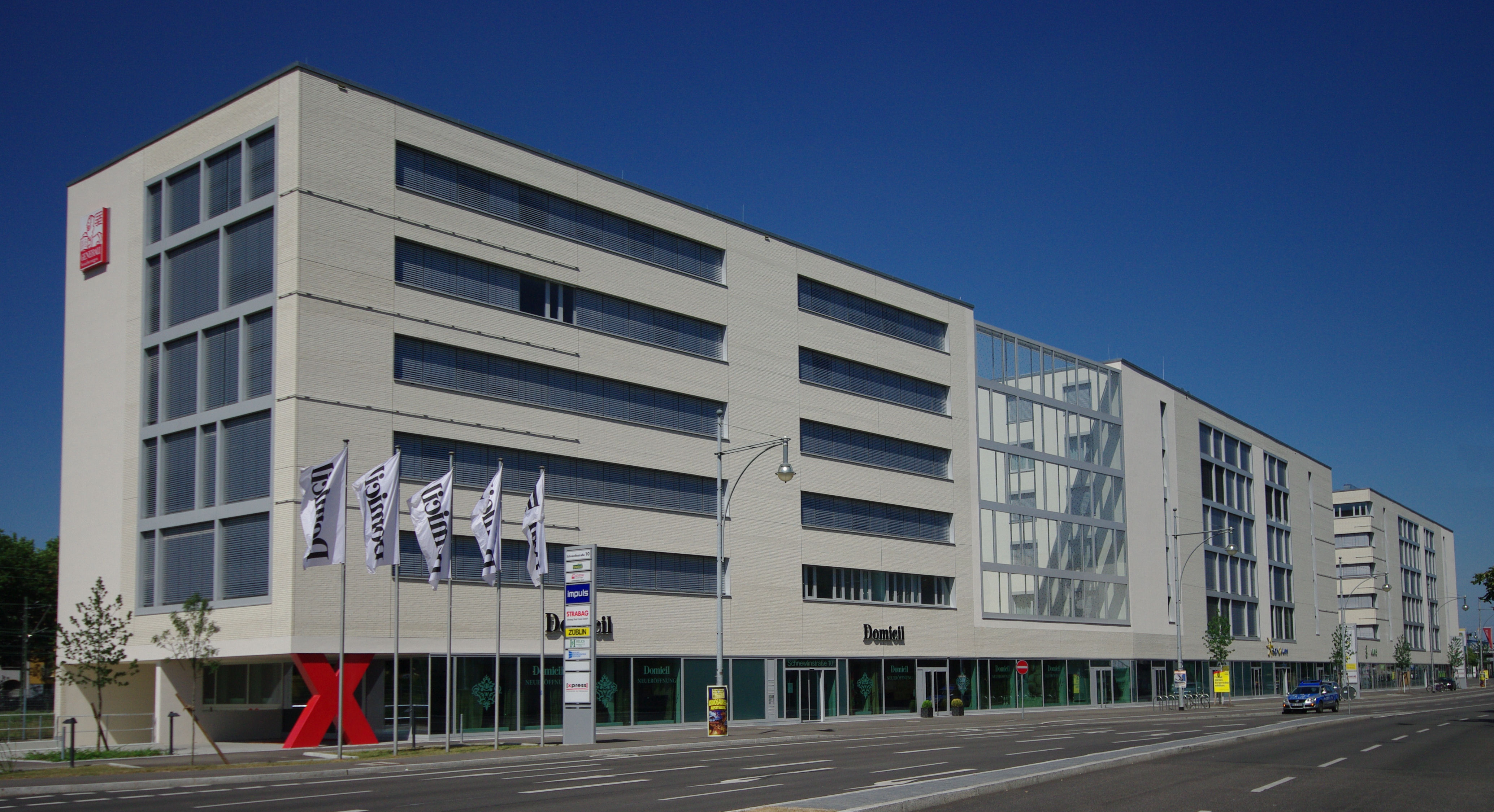 Der Bürogebäudebau in der Schnewlinstraße 2-10, unter anderem der Firmensitz von Family Media